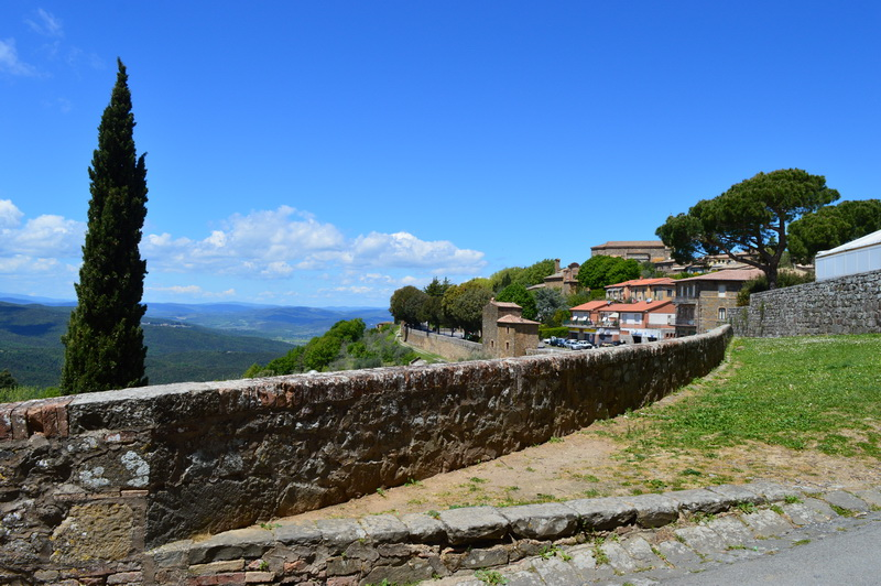 Монтальчино, вид с городского холма